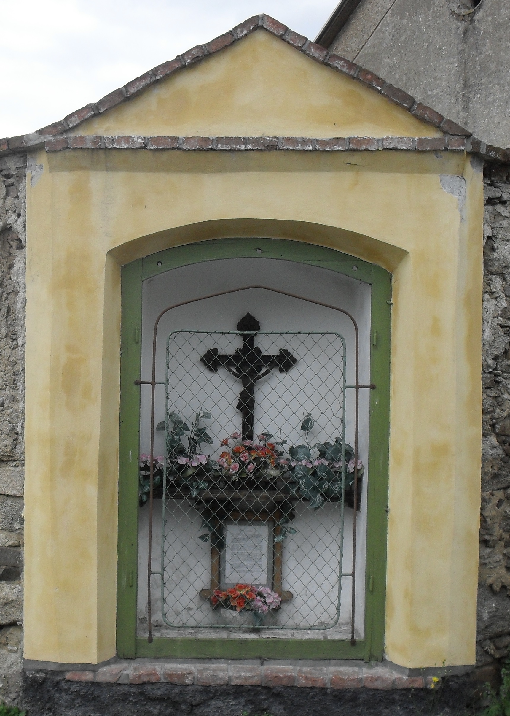 Fotografie pořízená v obci Slatina.